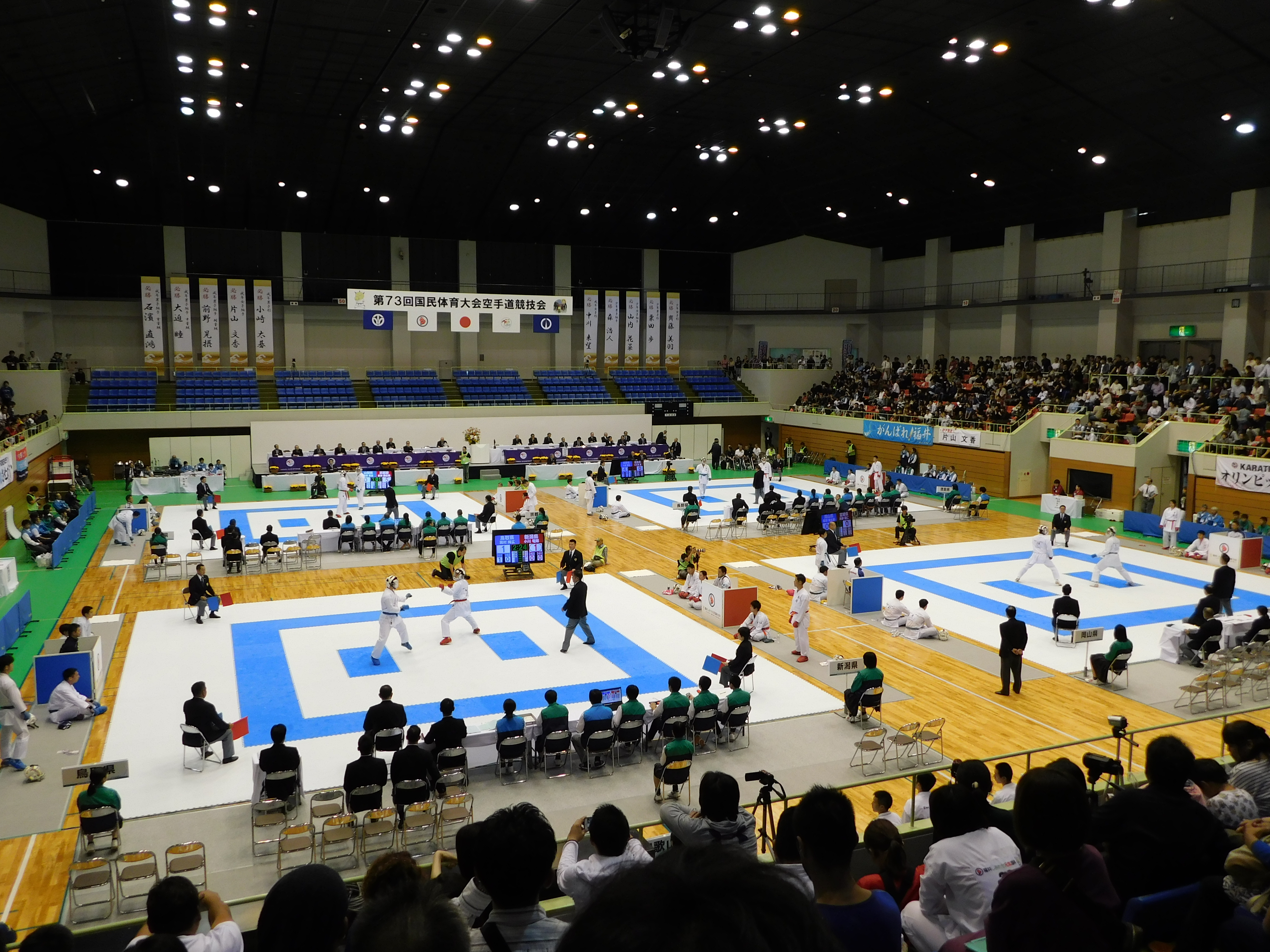 第73回国民体育大会の空手競技、福井県敦賀市総合運動公園体育館にて。